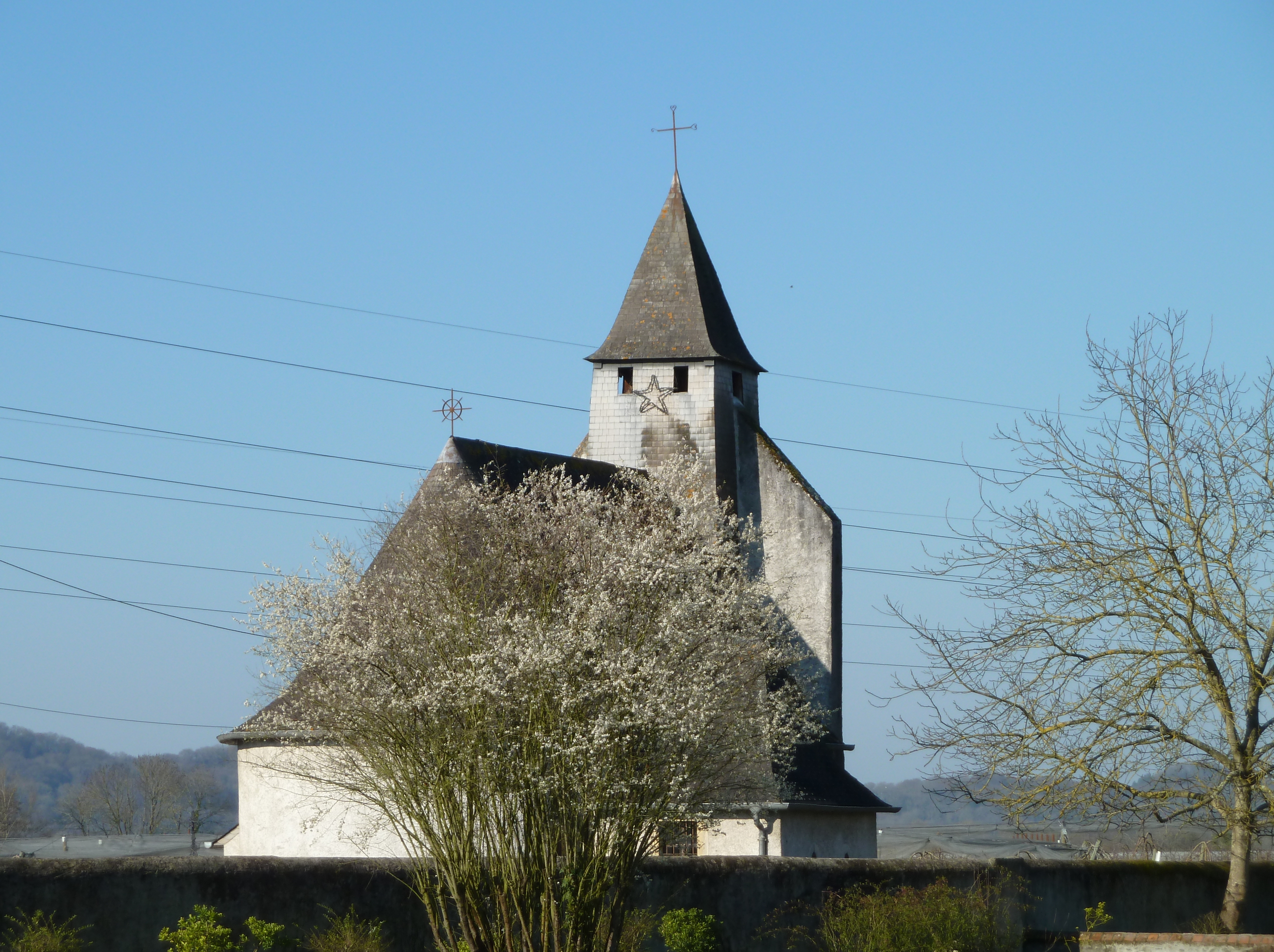 Église d'Aussevielle